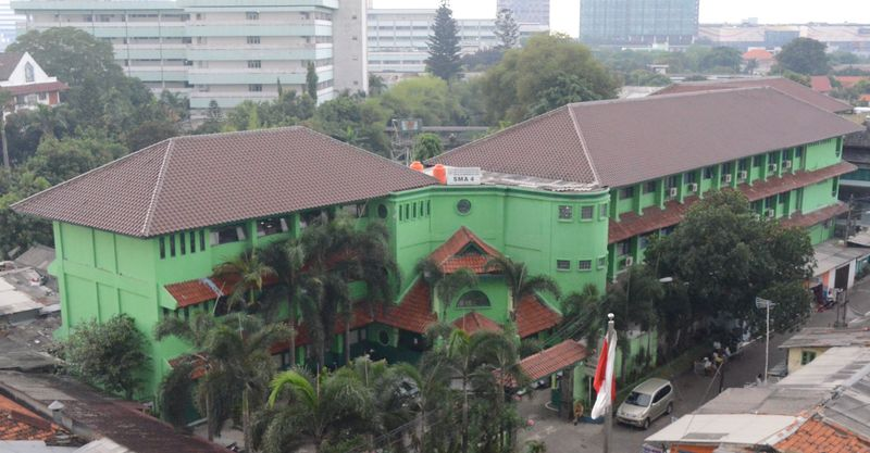 Tahun 2012, foto oleh Yosua Olgaf Rondonuwu